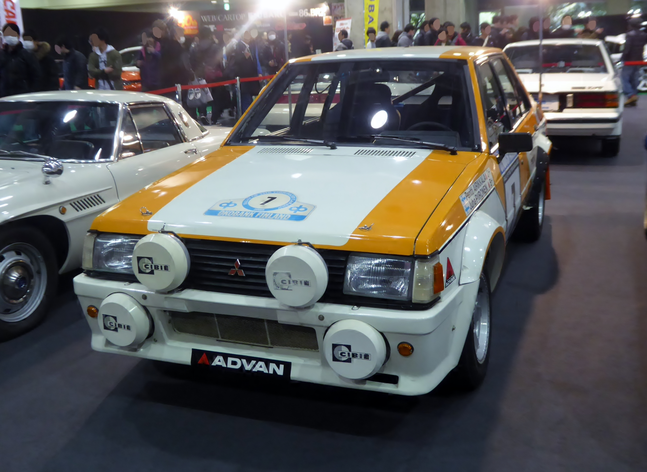 大阪オートメッセ2017に於いて三菱・ランサーEX2000ターボラリーカーを撮影。